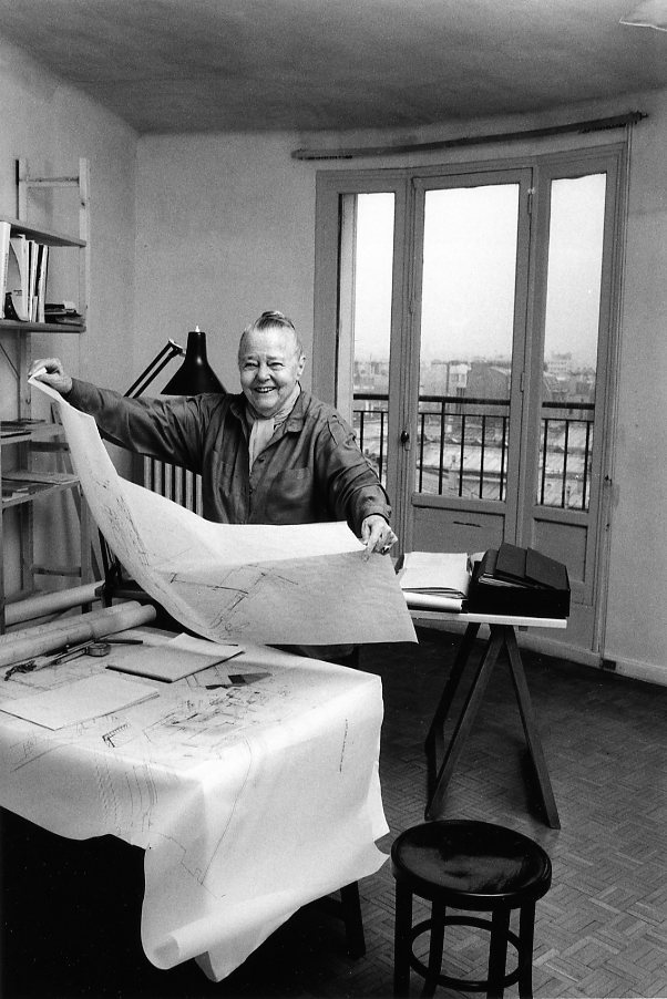 Шарлотта Перьен, фото Робера Дуано́, январь 1991